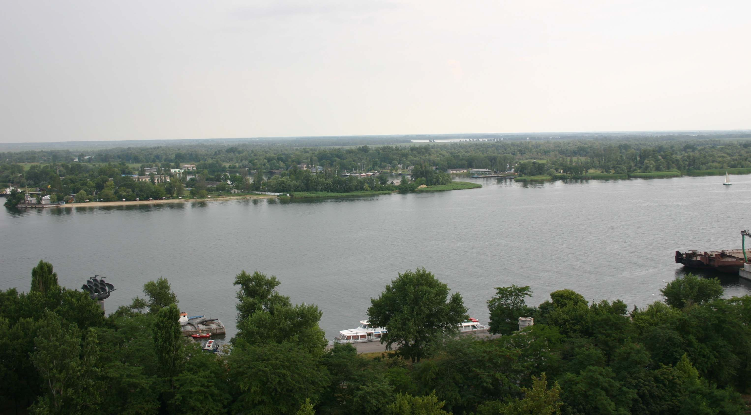 Dnjpr bei Cherson